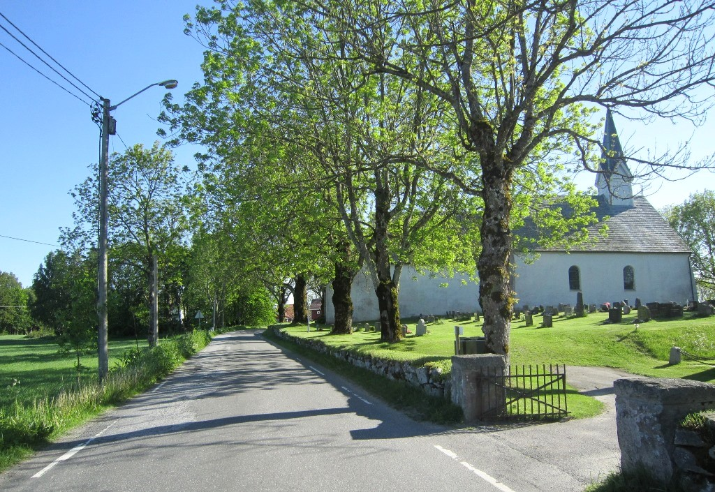 Berg kirke i Halden med fylkesvei 931 foran